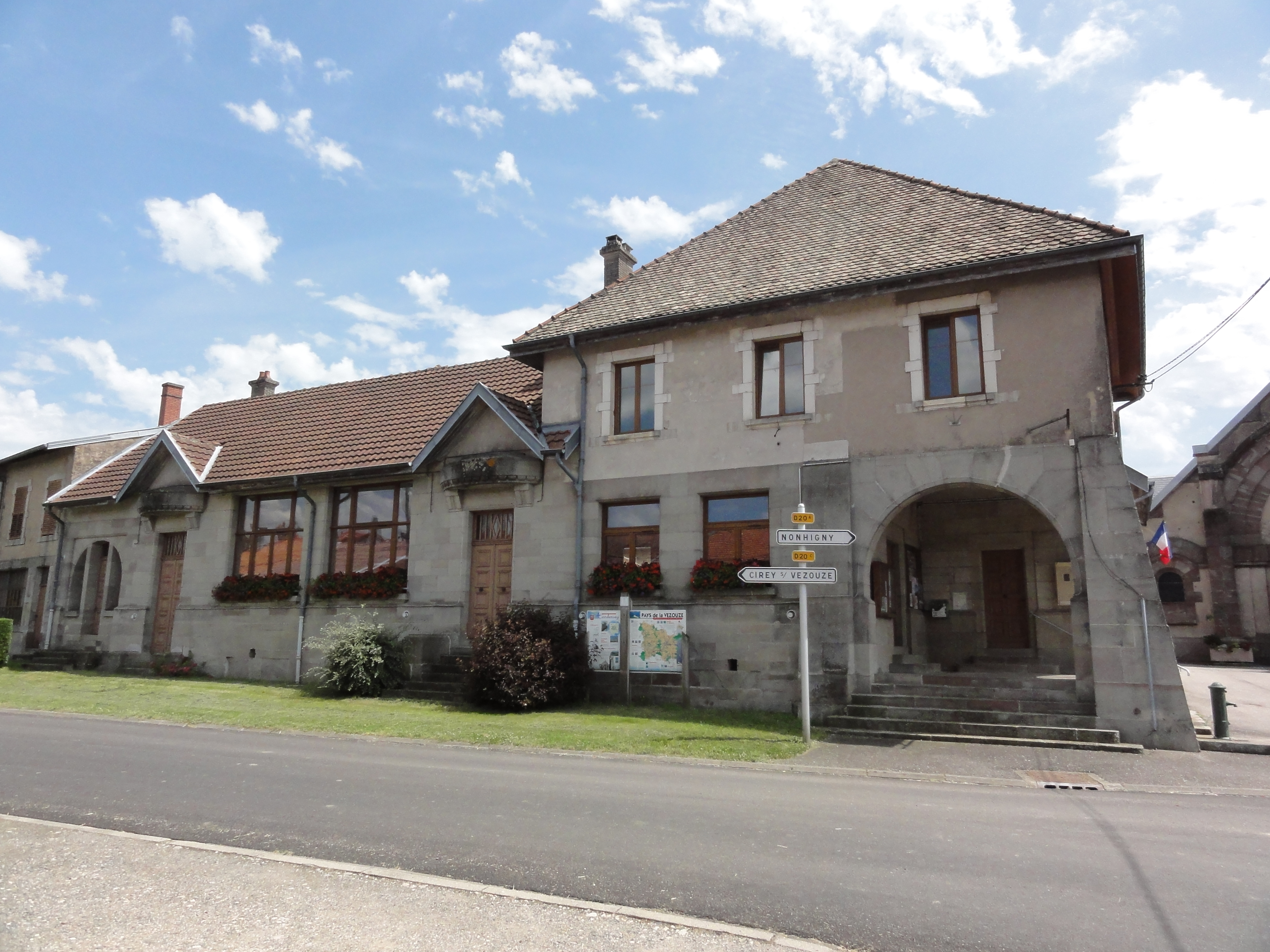 Harbouey (M-et-M) mairie - école